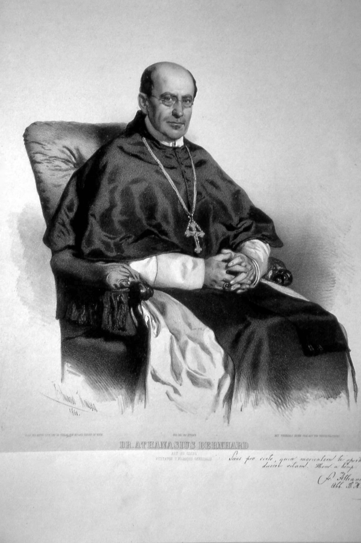 Athabasius Bernhard (1815-1875), Abt des Zisterzenserstiftes Osek. Lithographie von Eduard Kaiser, 1861